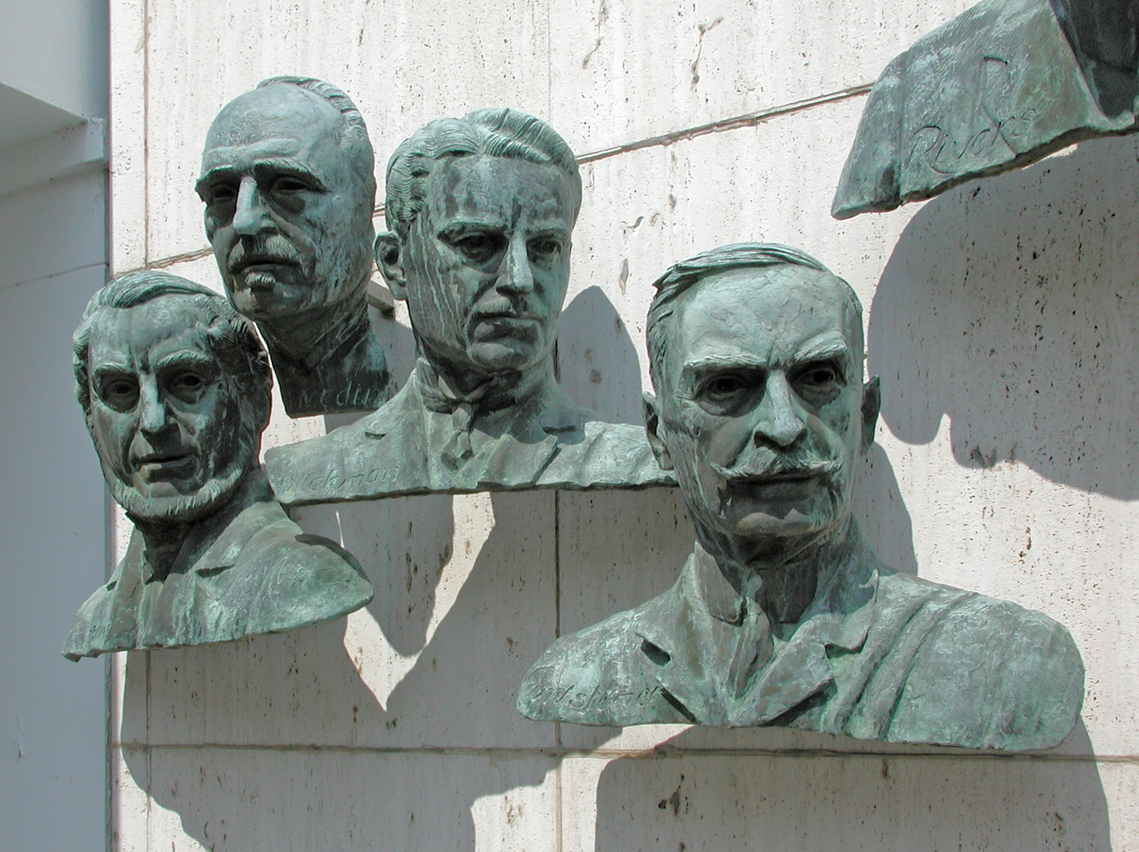 Jakob Heine, Karl Oskar Medin, Ivar Wickman, Karl Landsteiner at Warm Springs